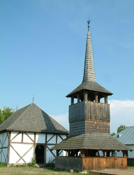 Nyíregyháza-Sóstó skanzen